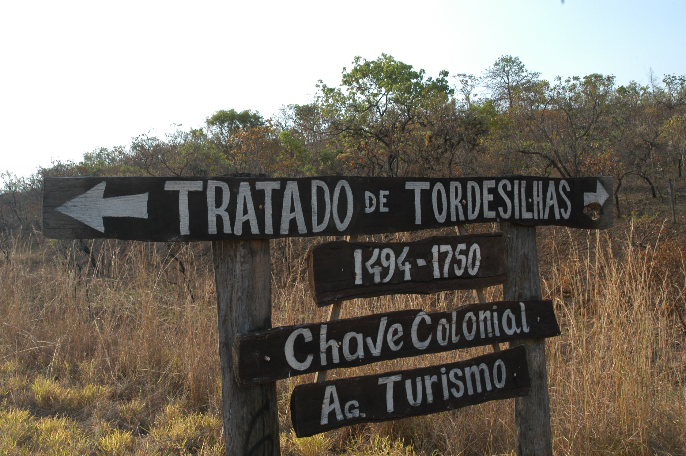 marcação do meridiano de tordesilhas